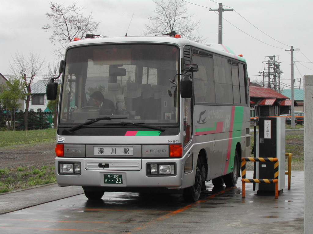 深川営業所内にて、許可を得て撮影